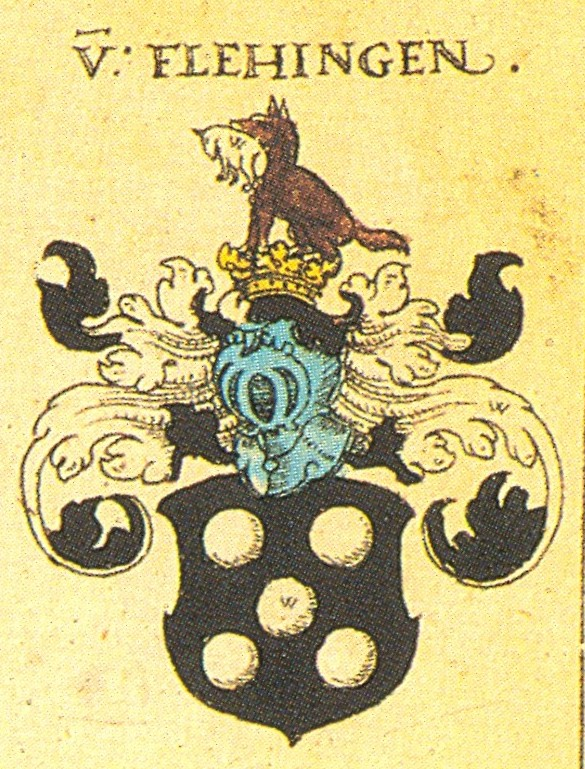 Ritterschaft und Adel in Schwaben von Flehingen